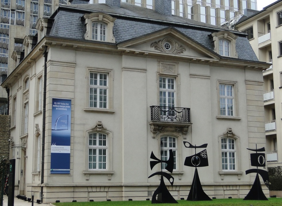 Villa Lamort, gebaut 1925